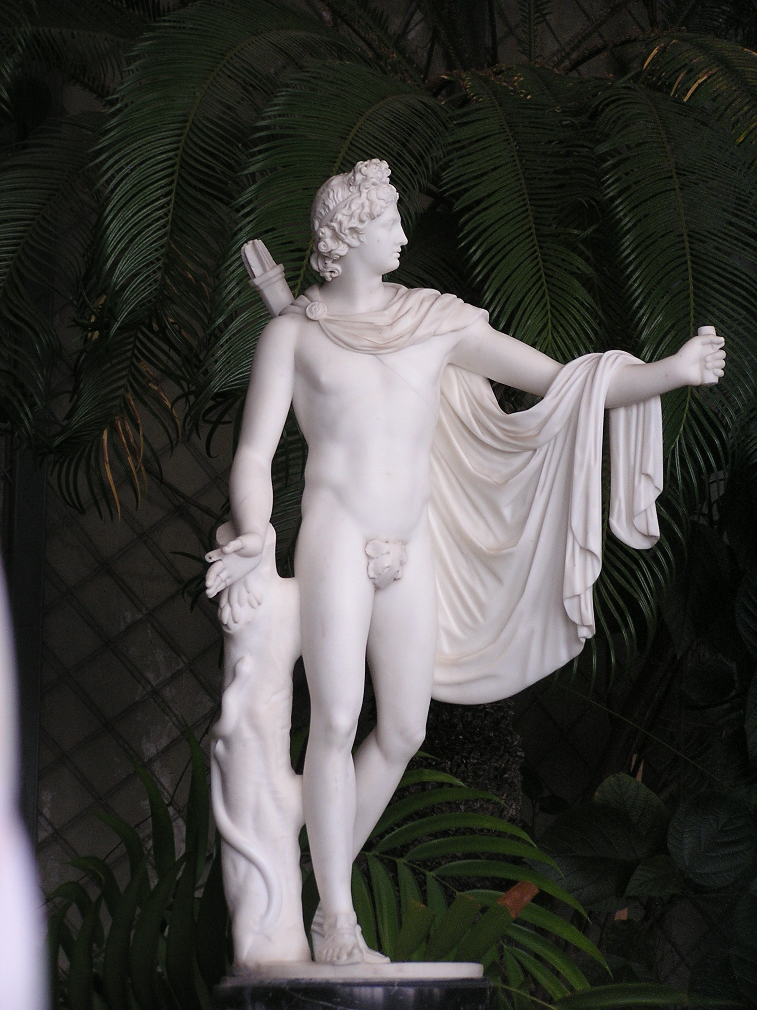 Алупка. Воронцовский дворец